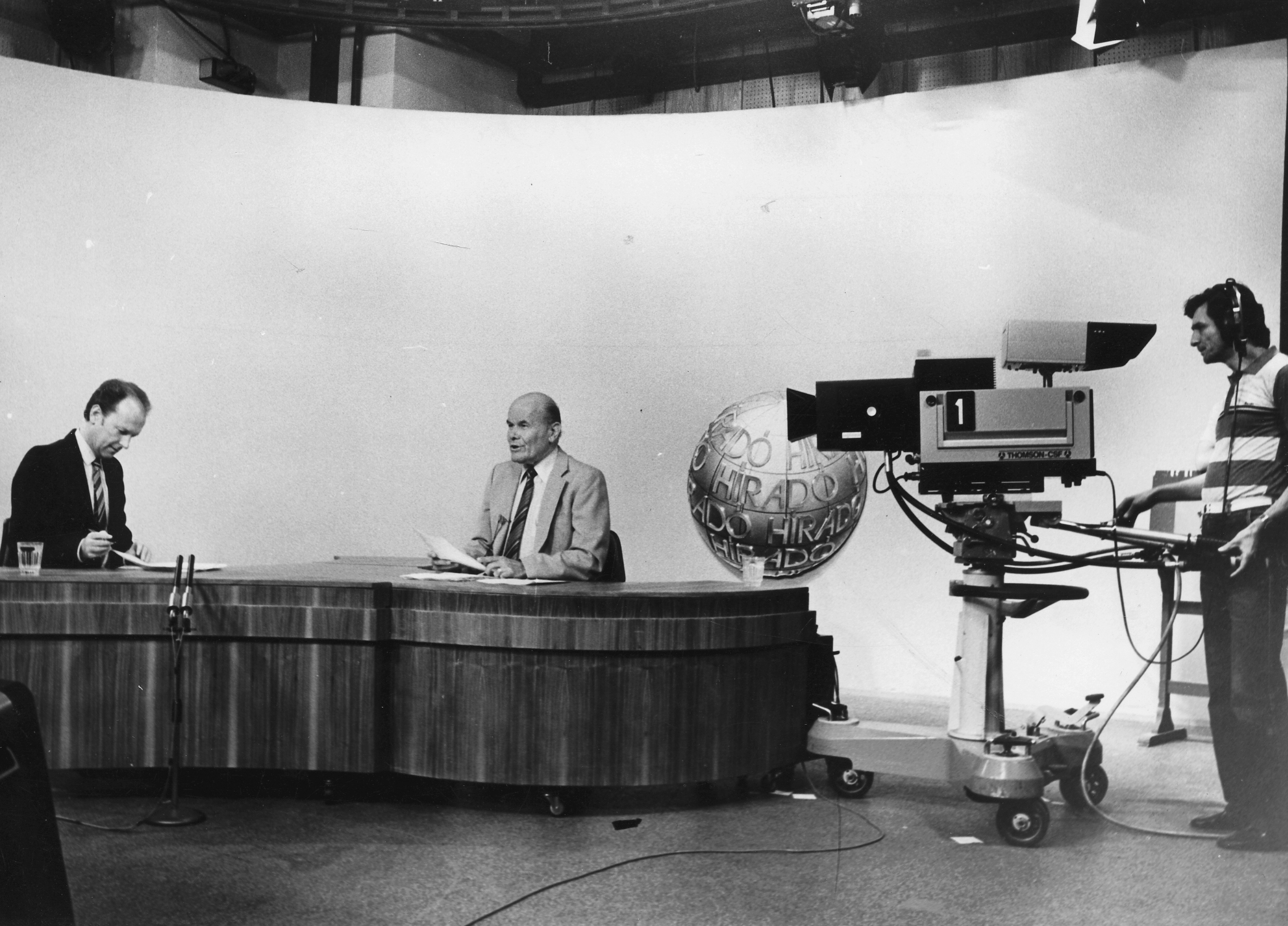 TV Híradó stúdiója, Novotny Zoltán sportriporter és dr. Pálfy József újságíró, műsorvezető és külpolitikai kommentátor. Location: Hungary, Budapest V. Tags: Hungarian TV, Budapest Title: TV Híradó stúdiója, Novotny Zoltán sportriporter és dr. Pálfy József újságíró, műsorvezető és külpolitikai kommentátor.